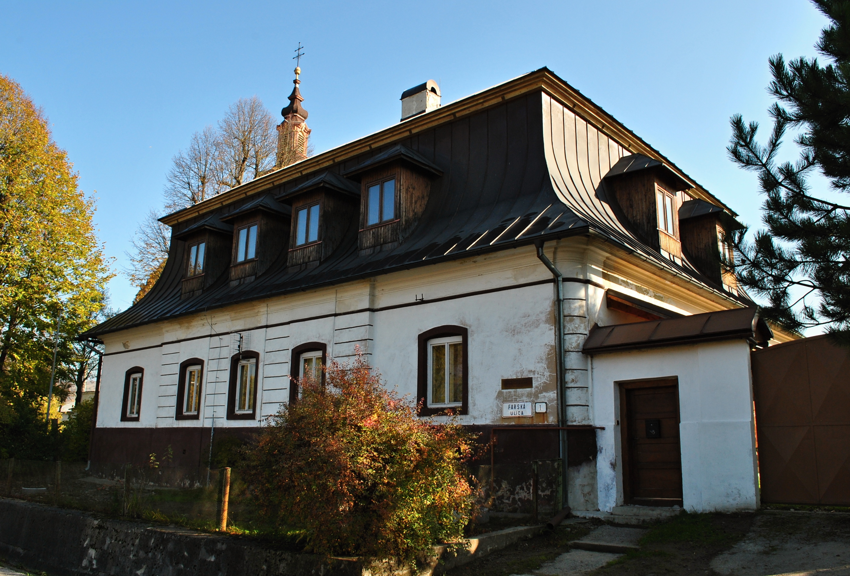 Fara